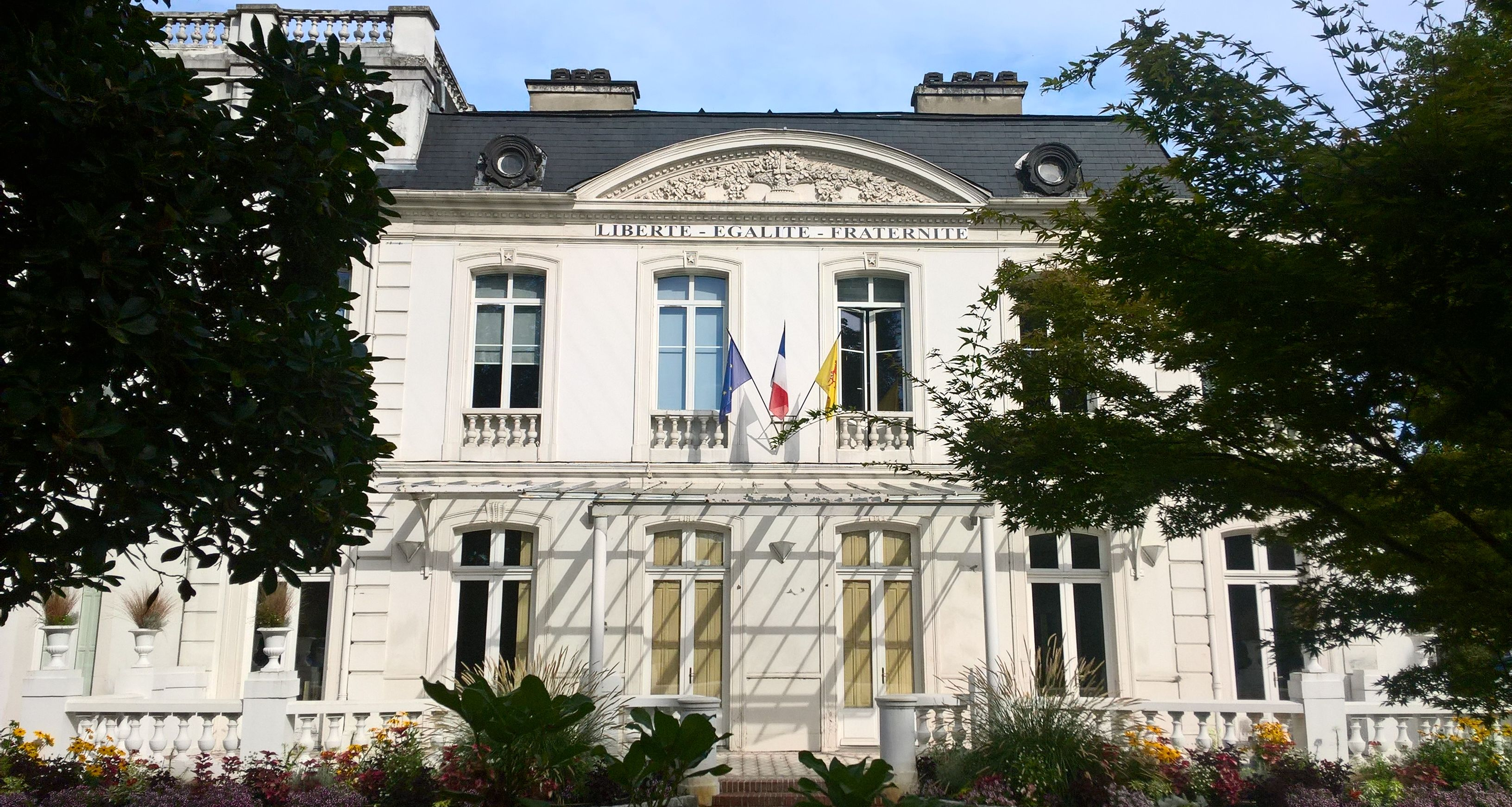 Façade de l'Hôtel de Ville de Billère